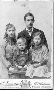 Retrato de los hermanos Morales Wilskman, Olallo (músico), Zelmica, Matilde y Juan